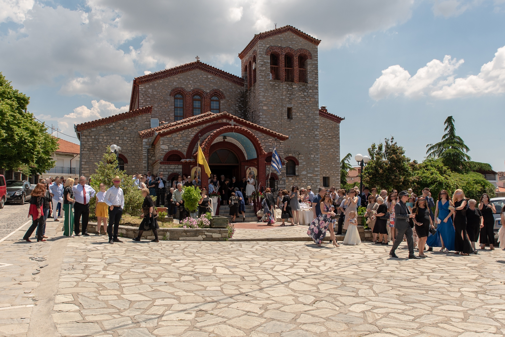 Είσοδος εκκλησίας